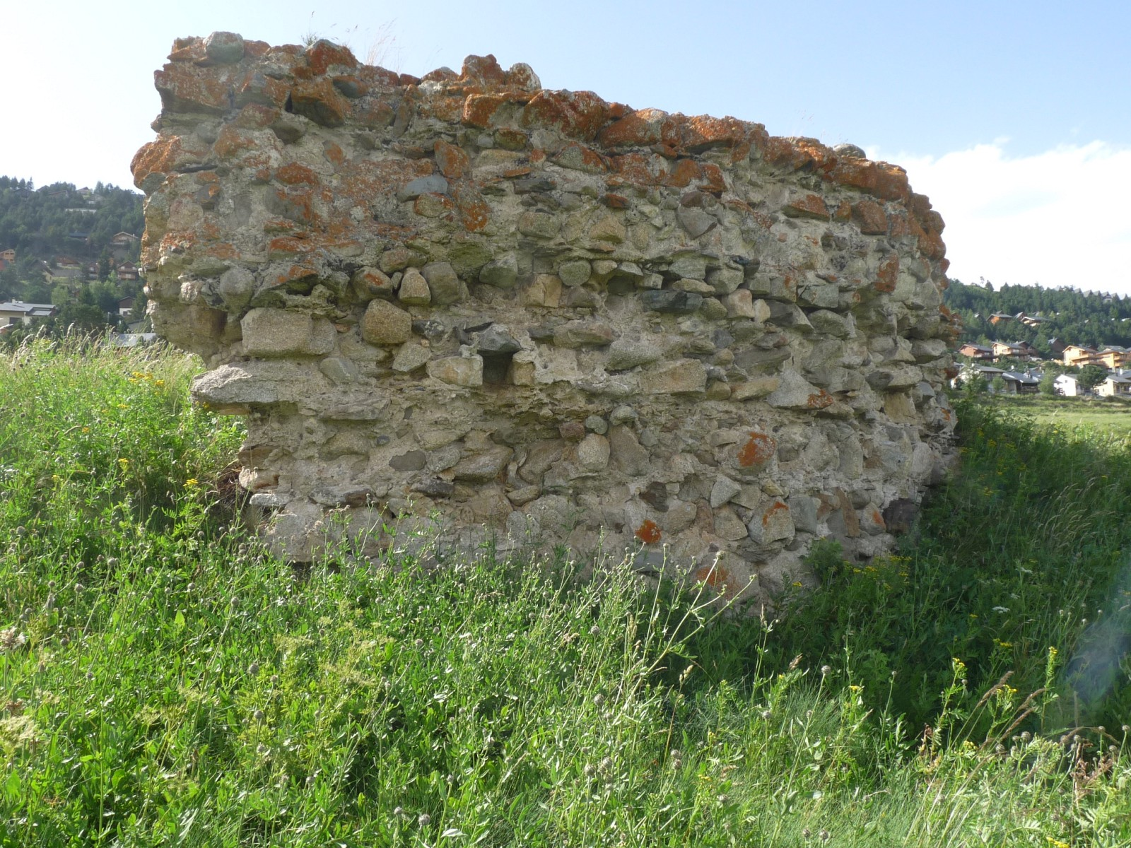 Ruines de l'église St-Sauveur, Les Angles, Pyrénées-Orientales, France